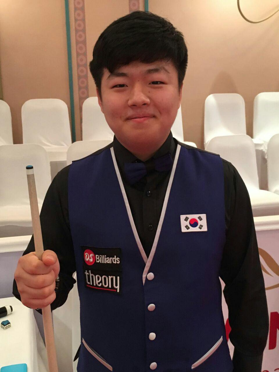 Sieger der Dreiband-Weltmeisterschaft der Junioren, Cho Myung-woo